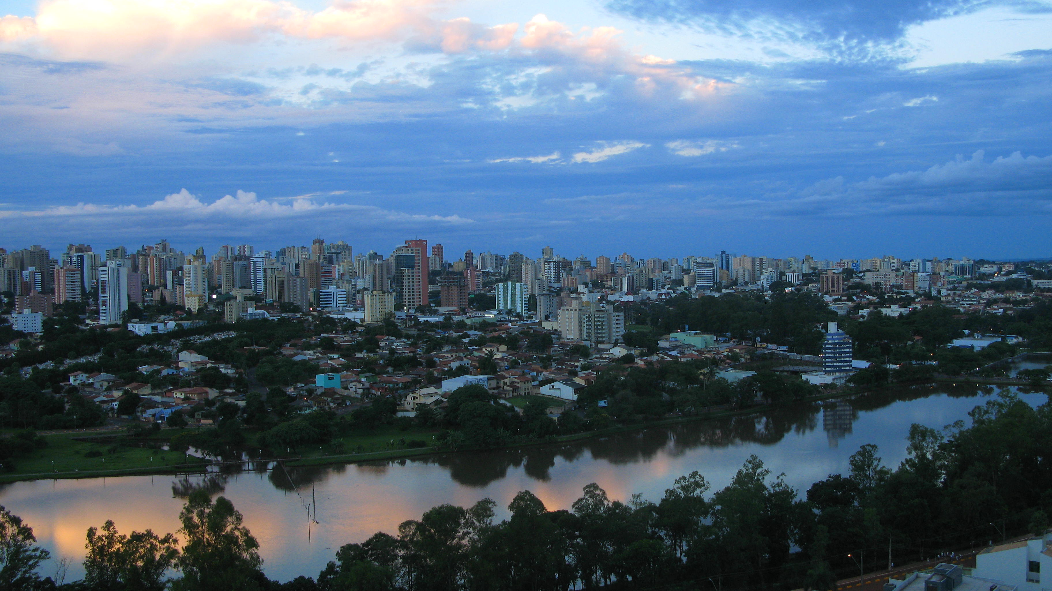 Lago Igapó, Londrina, Paraná